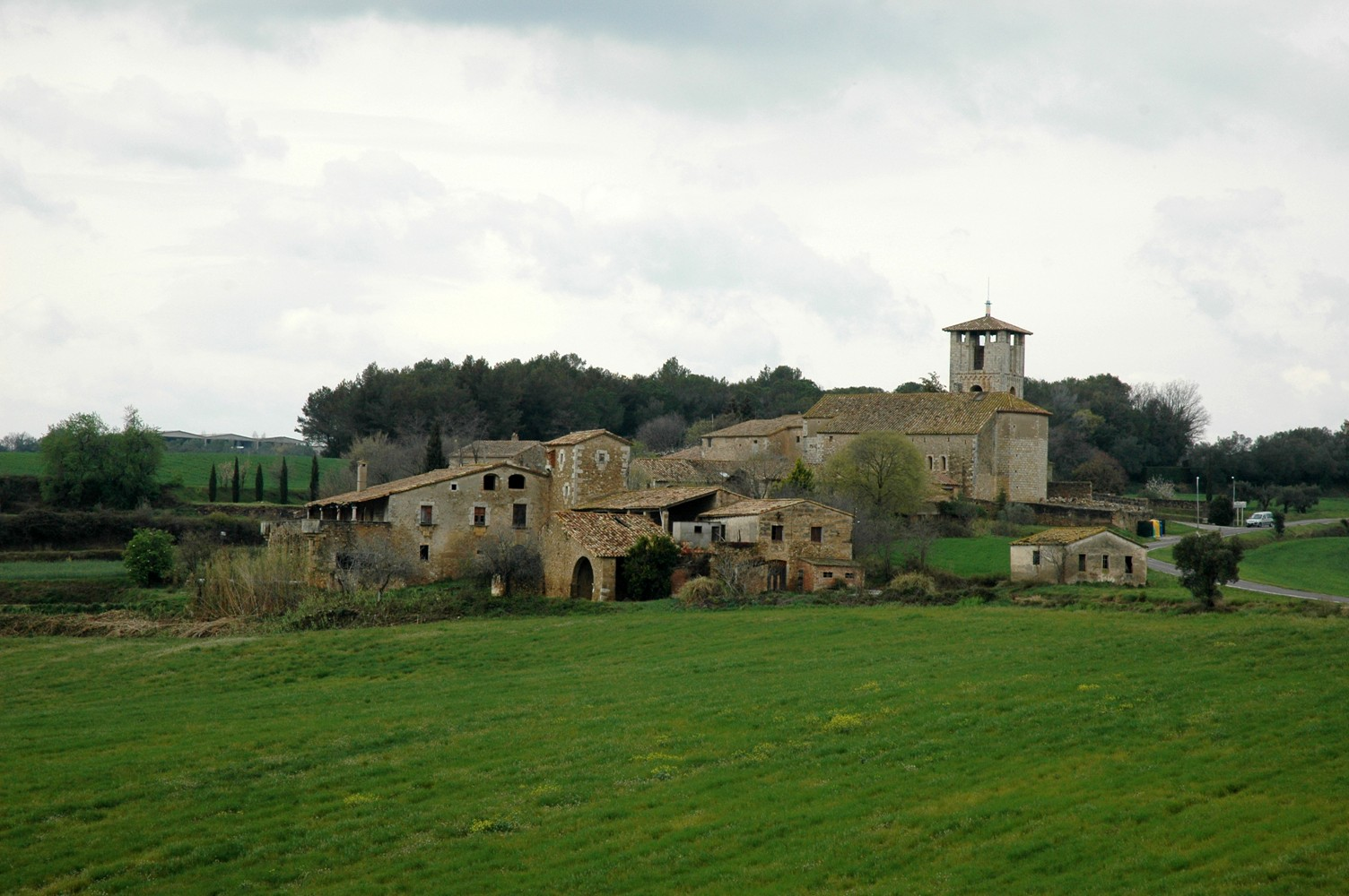 Fontcoberta, Pla de l'Estany, Catalonia